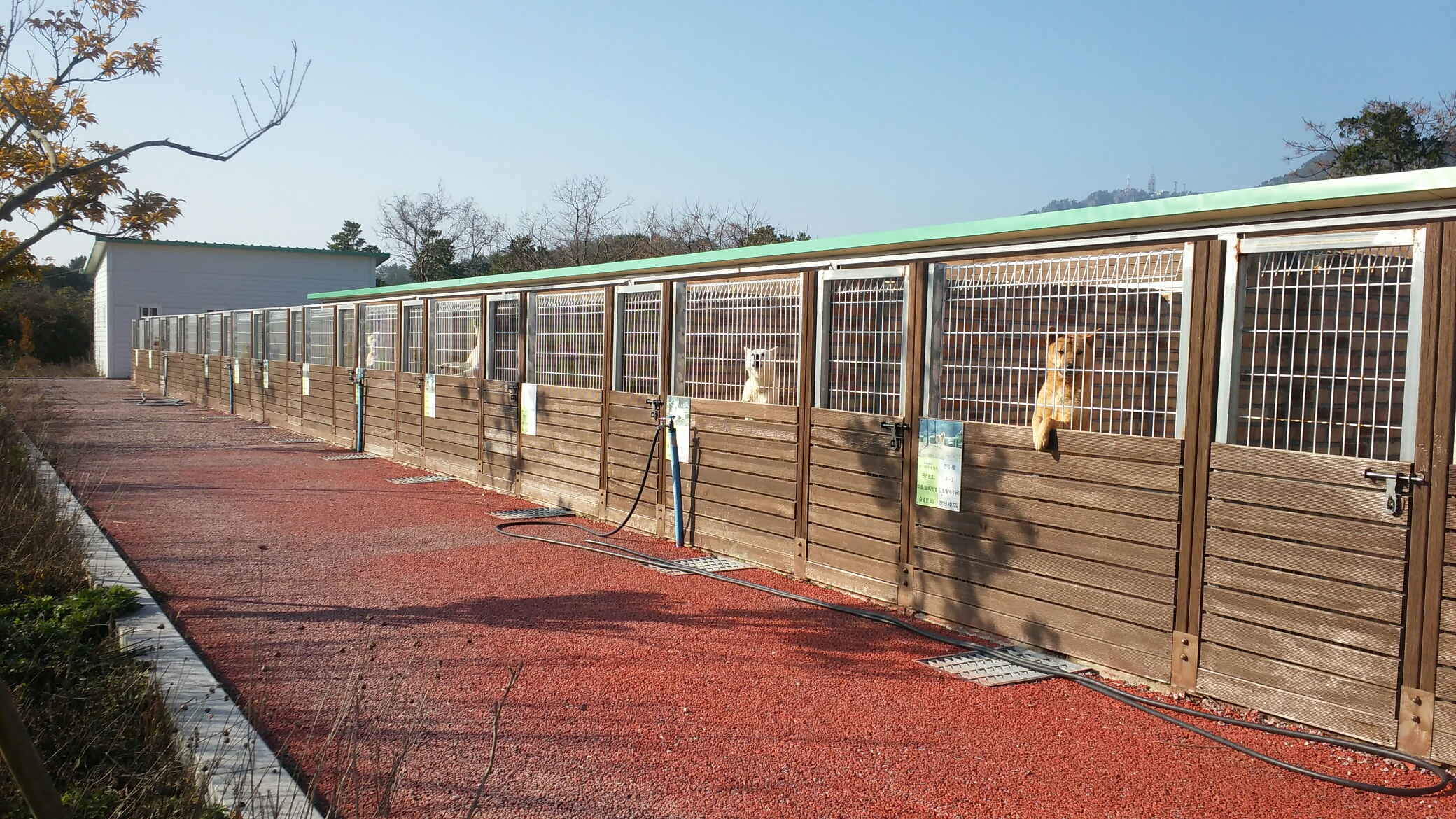 진도개 테마파크